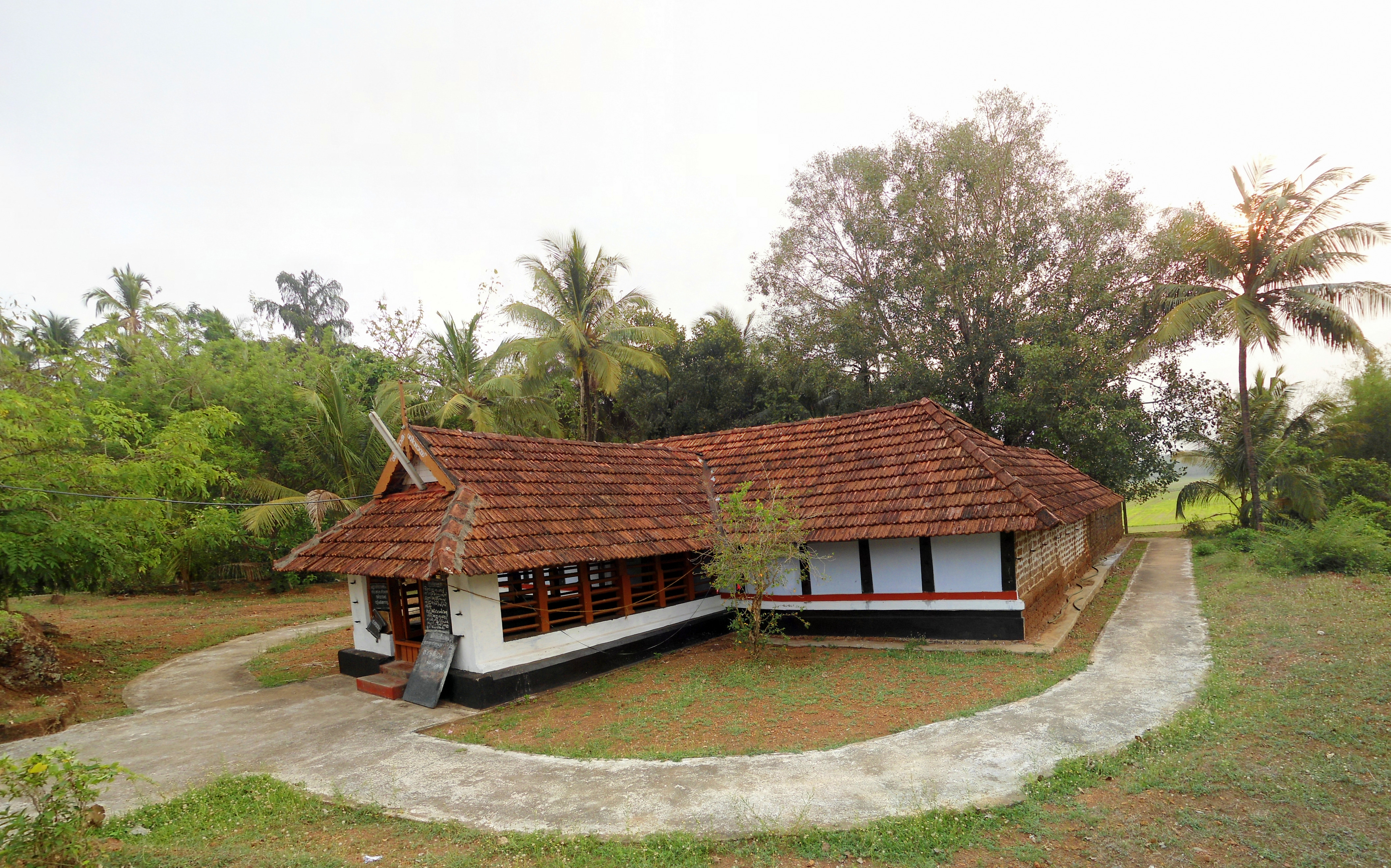 തൃശ്ശൂർ ജില്ലയിലെ അടാട്ട് ഗ്രാമത്തിലാണ് അടാട്ട് മഹാദേവക്ഷേത്രം സ്ഥിതിചെയ്യുന്നത്. പരശുരാമനാൽ പ്രതിഷ്ഠിക്കപ്പെട്ടു എന്നു വിശ്വസിക്കുന്ന നൂറ്റെട്ടു ശിവക്ഷേത്രങ്ങളിൽ ഒന്നാണിത്.